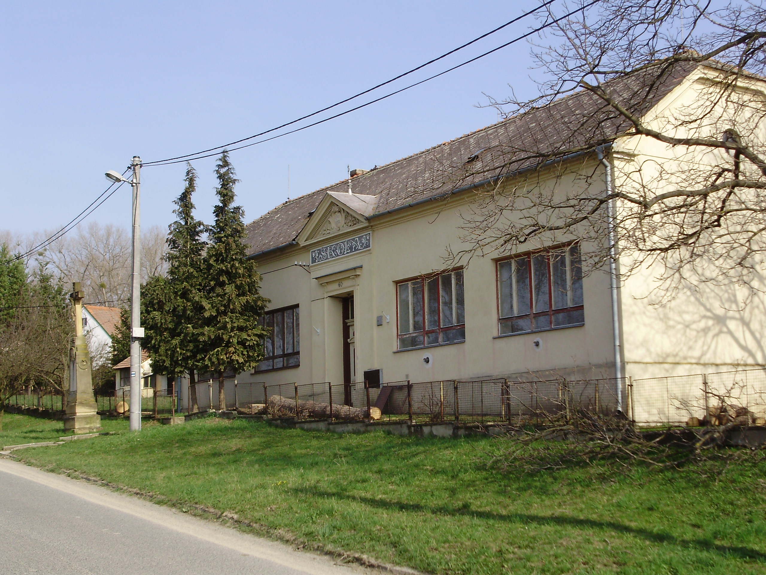 Pavlovice bývalá škola (Vyškov- Czech republic)